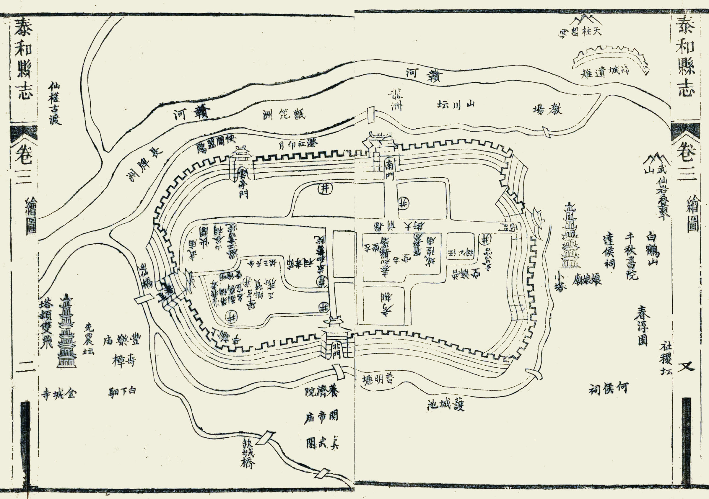 清朝江西泰和城池，上方朝南